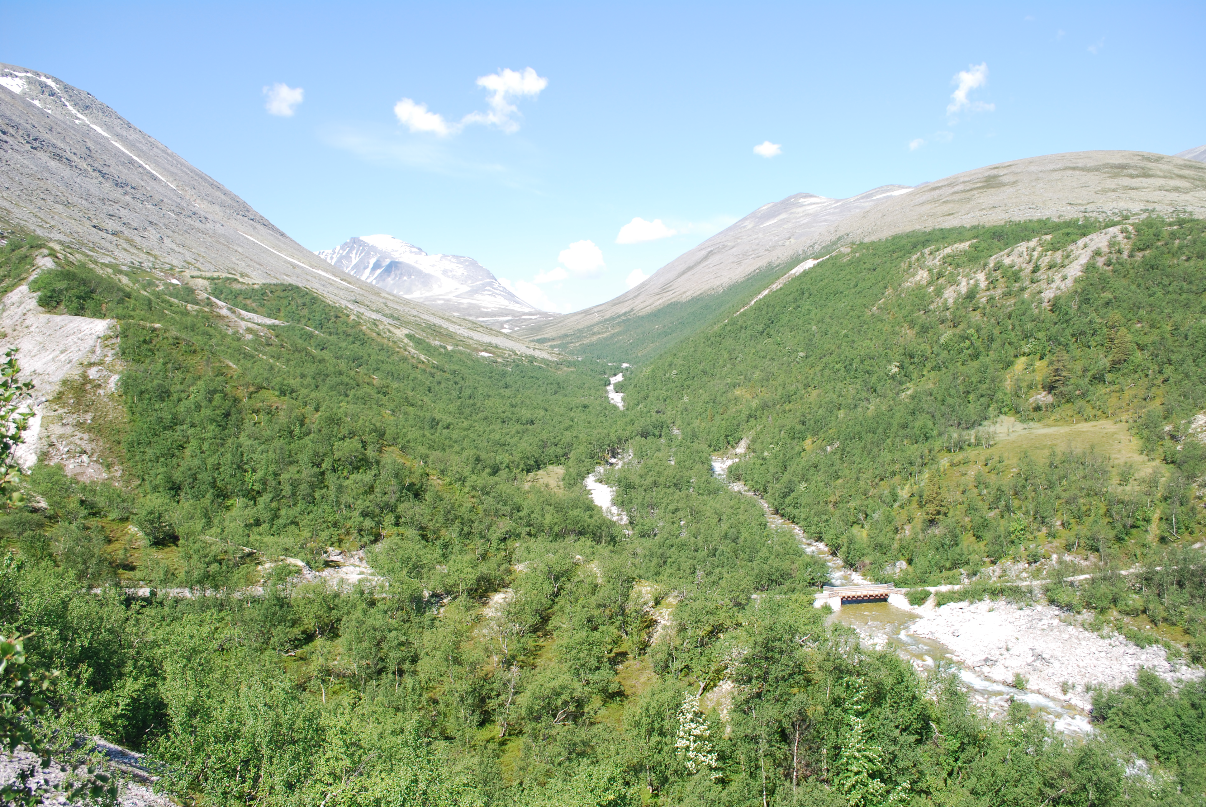 Østre del av Langglupdalen med Langglupbekken i midten av bildet. Denne krysses av en bru på en avstengt traktorvei som går fra Gammelgården (ved Riksvei 27) til turisthytten Bjørnhollia. Veslkollhøe (1199 moh) ligger til høyre og Østre Rondvasshøgde (1838 moh) til venstre. Rondslottet (2178 moh) troner i bakgrunnen.